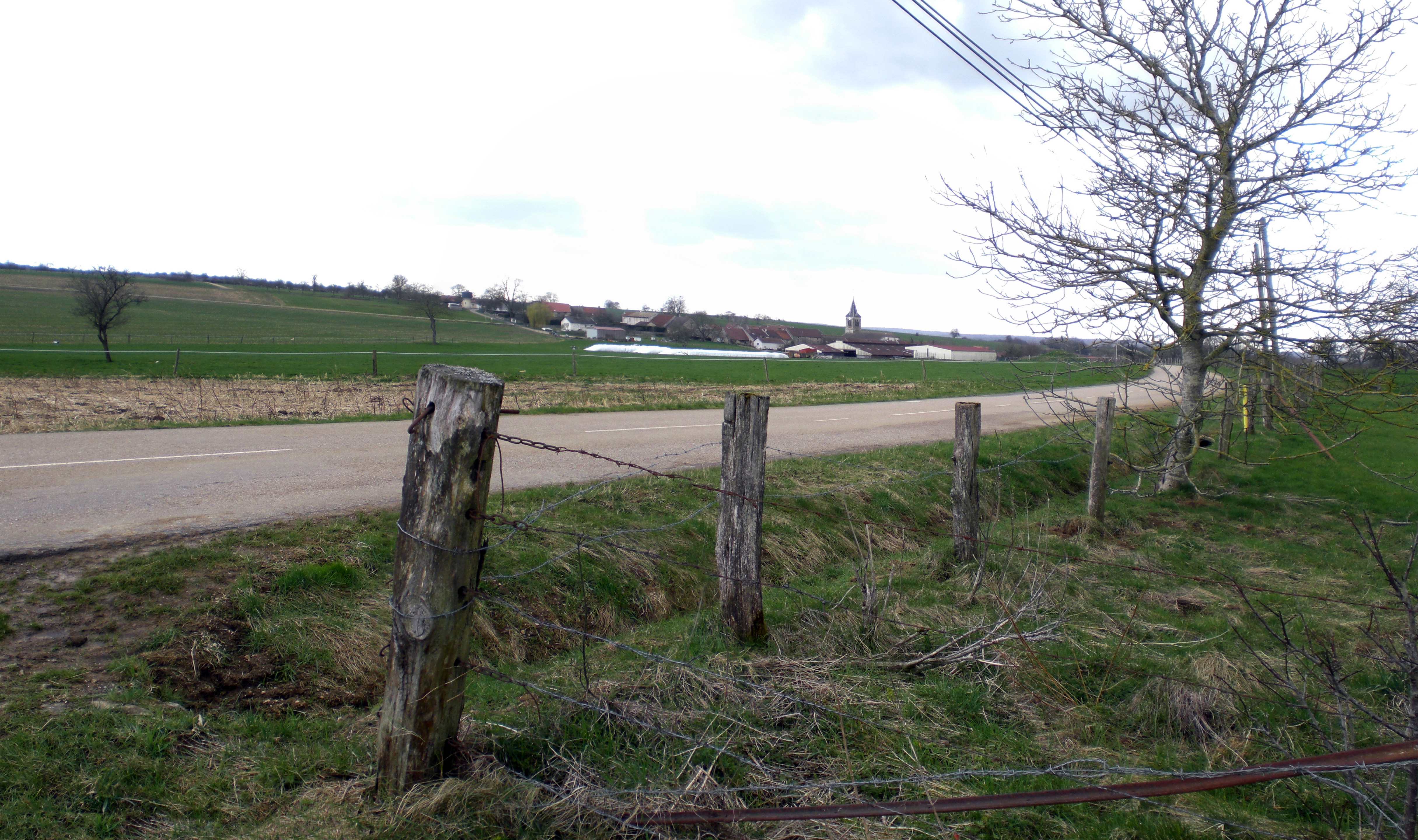 Avranville von der D3 von Osten aus